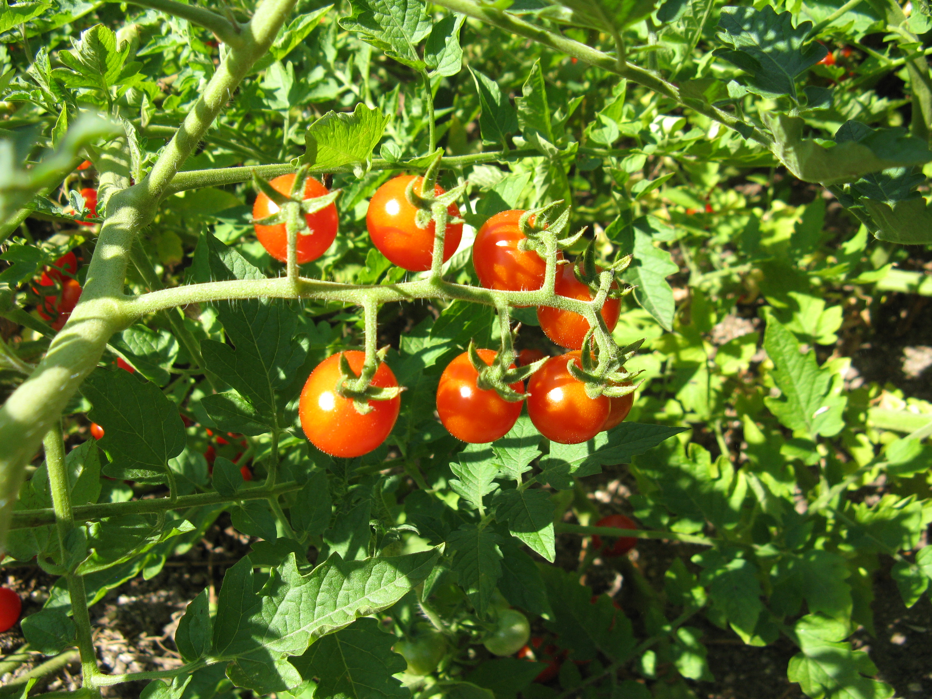 Scientific name Solanum pimpinellifolium